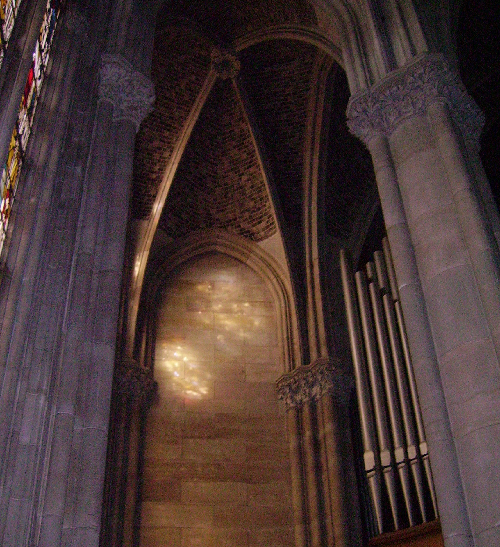 Gedächtniskirche (Memorial Church) in Speyer, Germany